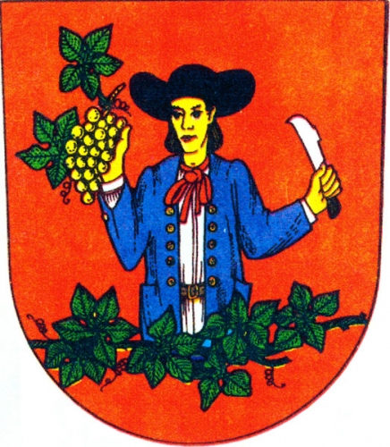 znak, Olbramovice, okres Znojmo